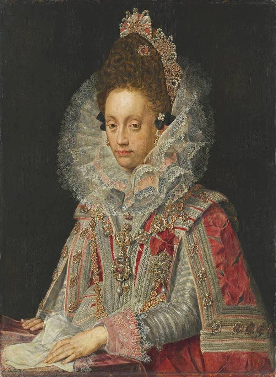 Repräsentatives Halbfigurenbildnis in manieristischer Weise gemalt. Vermutlich anlässlich der Hochzeit mit Herzog Wolfgang Wilhelm von Pfalz-Neuburg angefertigt.